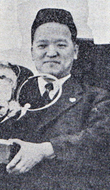 加藤雄策